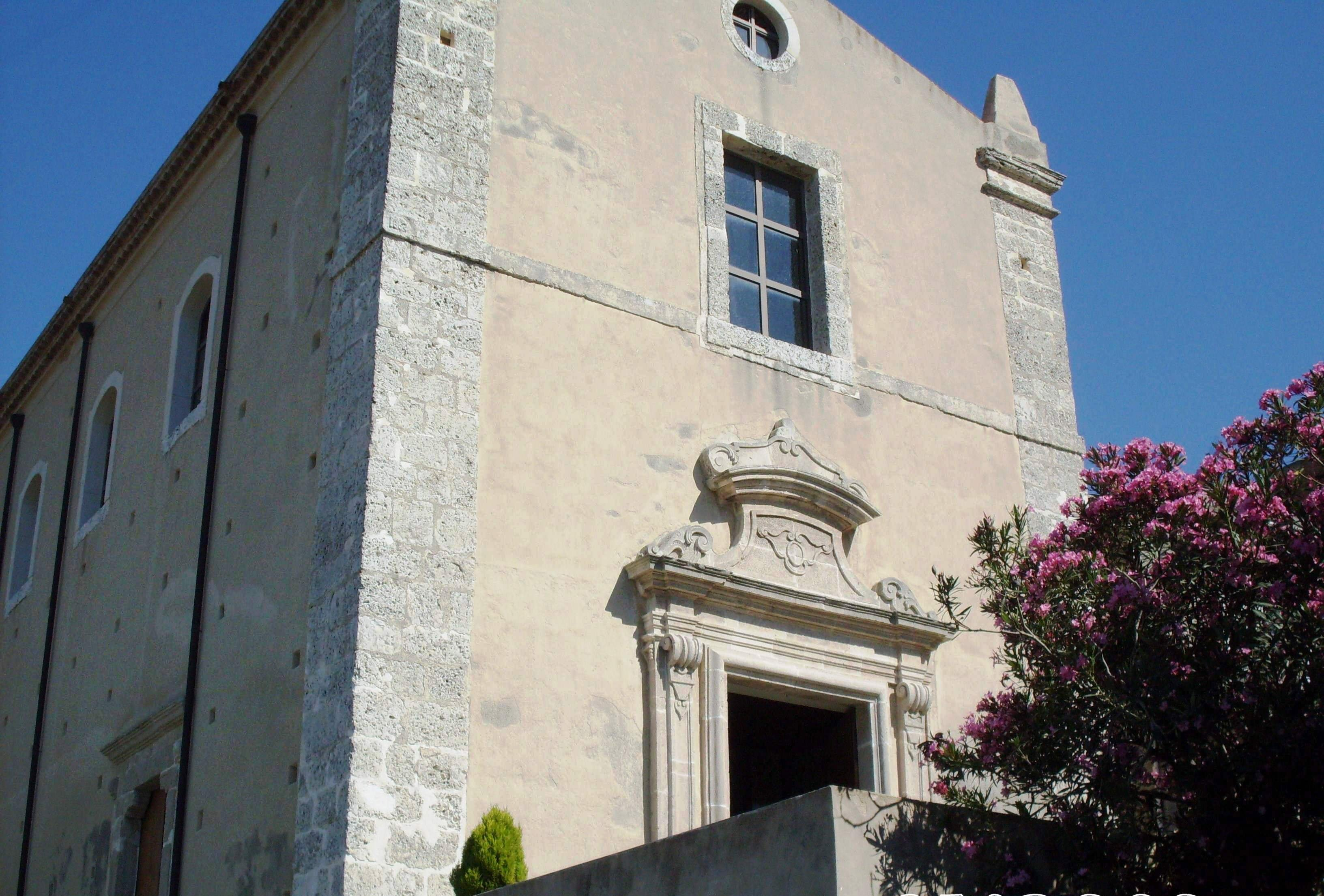 Foto alla chiesa di Sant'Anna a Venetico Superiore